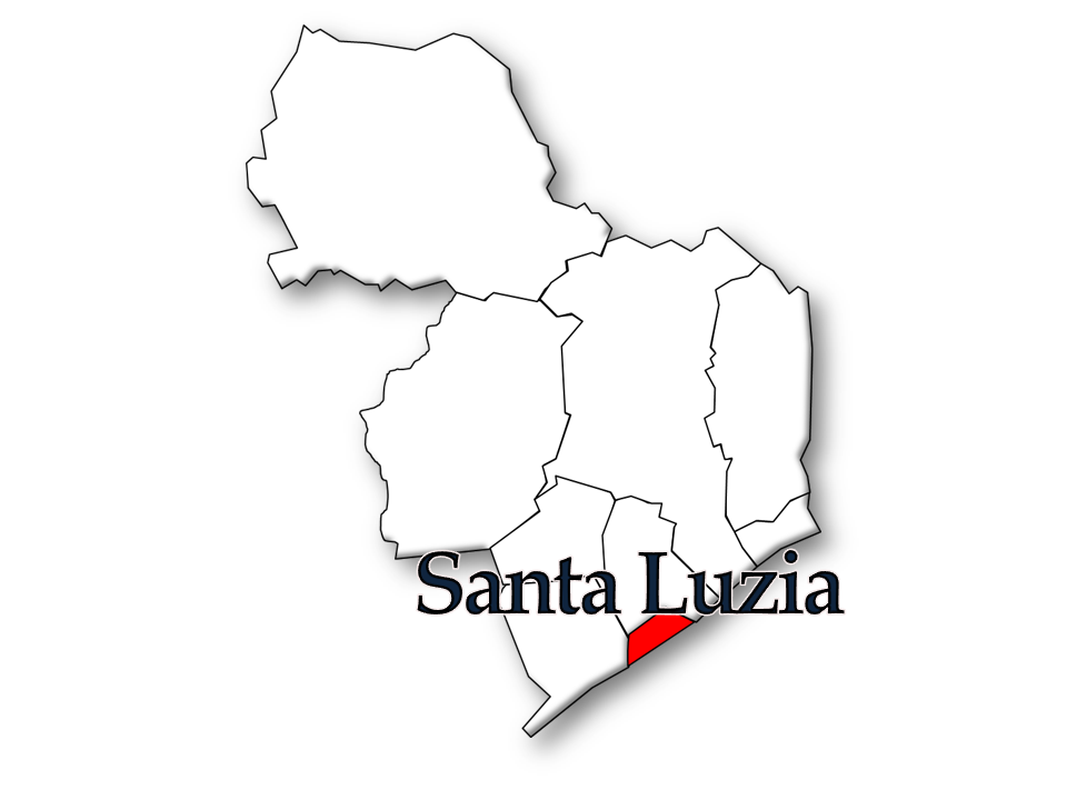 Censos 1864/2011